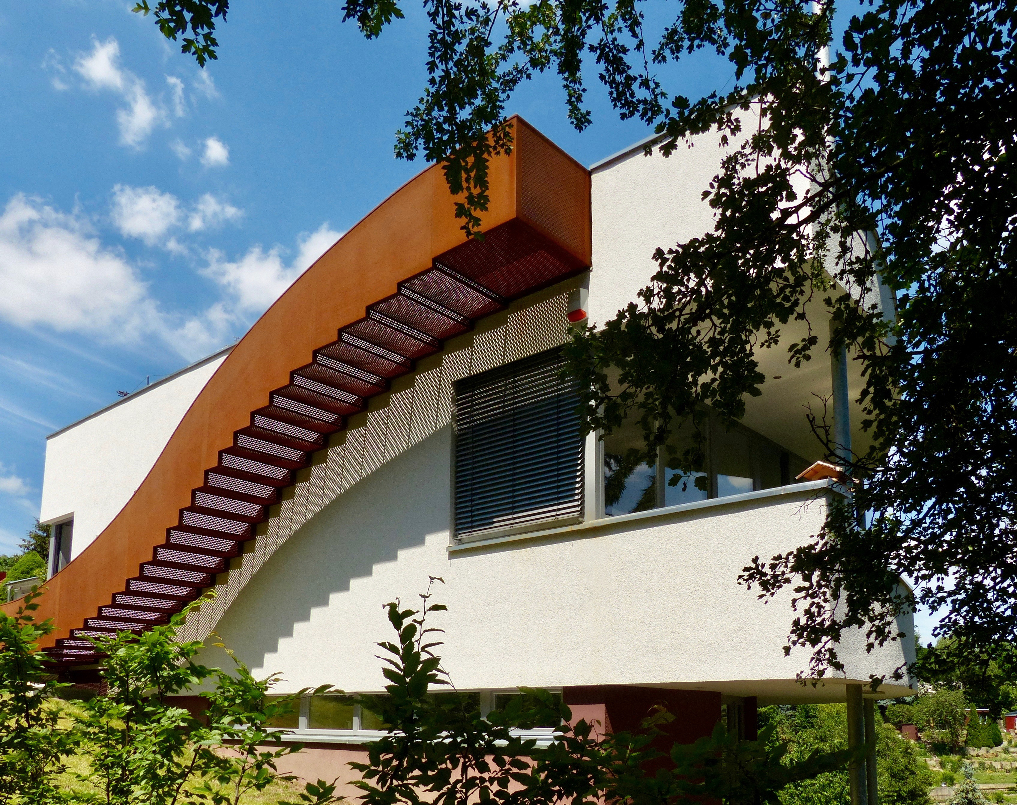 Durch das Architekturbüro Baarß + Löschner im Jahr 2016 realisierte Sinustreppe an einem Einfamilienhaus in Meißen.